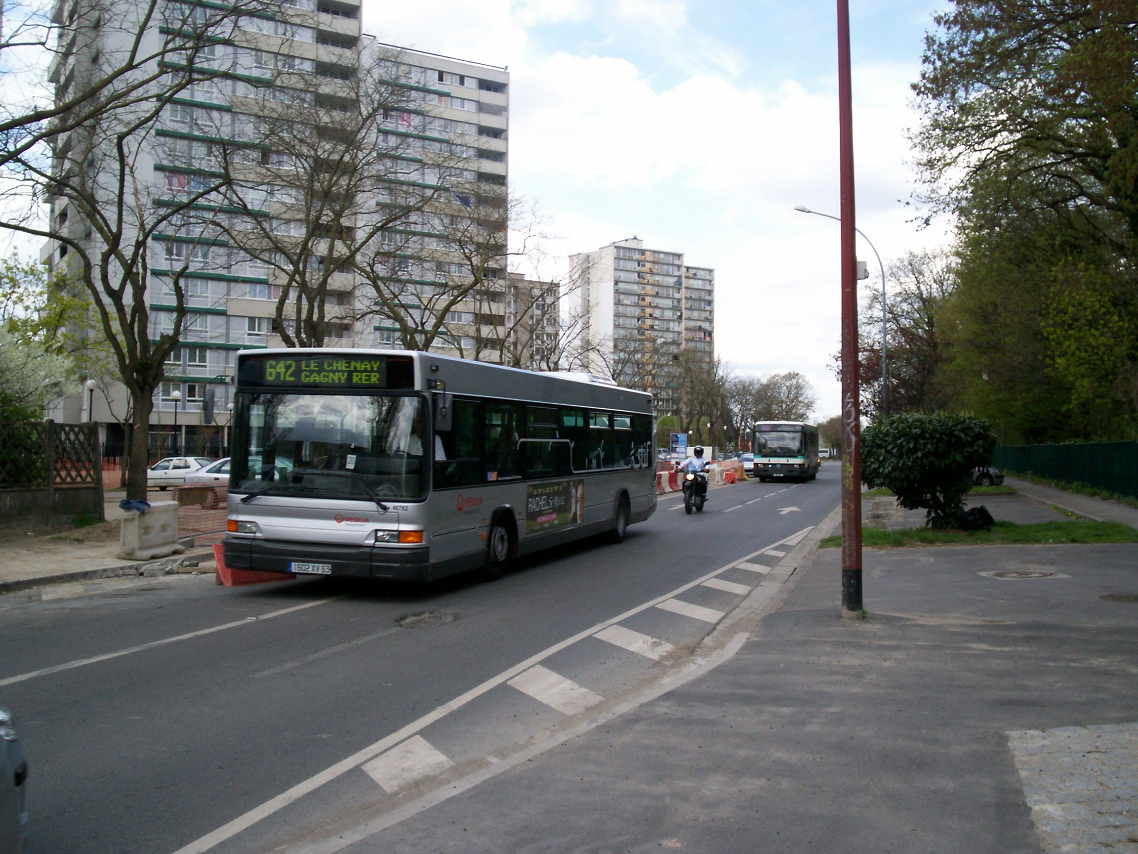 Bus en nouvelle livrée Veolia Transport - STIF d'un GX 317 sur la ligne 642 Veolia TRA